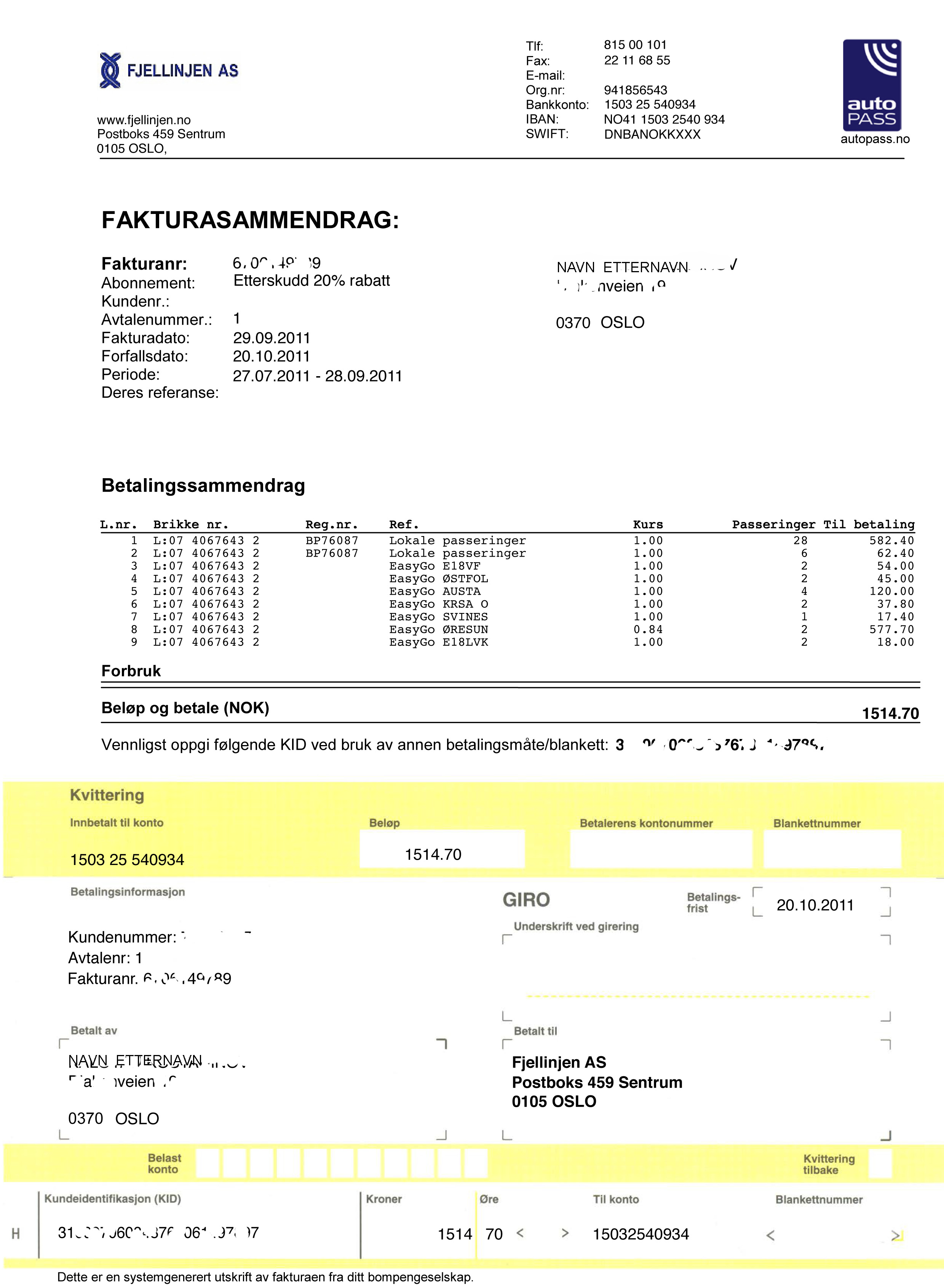 Regning for passering av bomsjoner